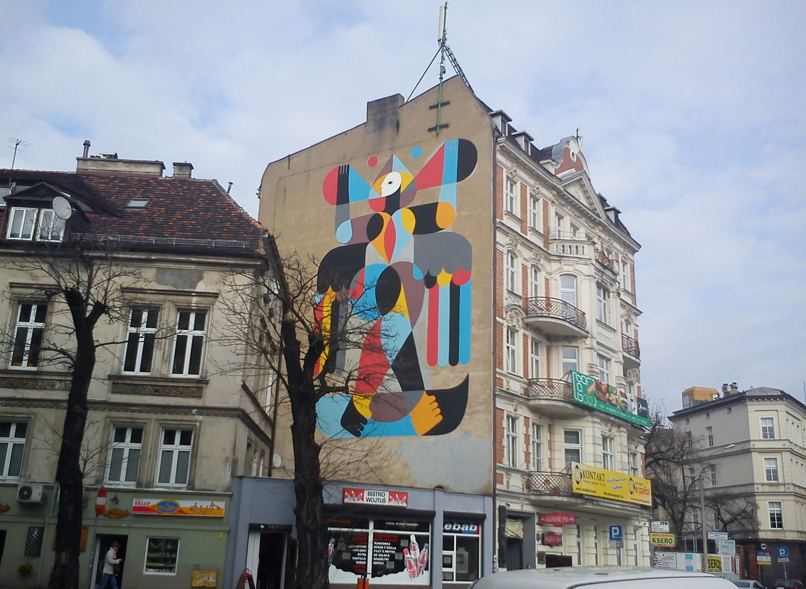 Graffiti - Poznań, ul. Taczaka/Kościuszki.